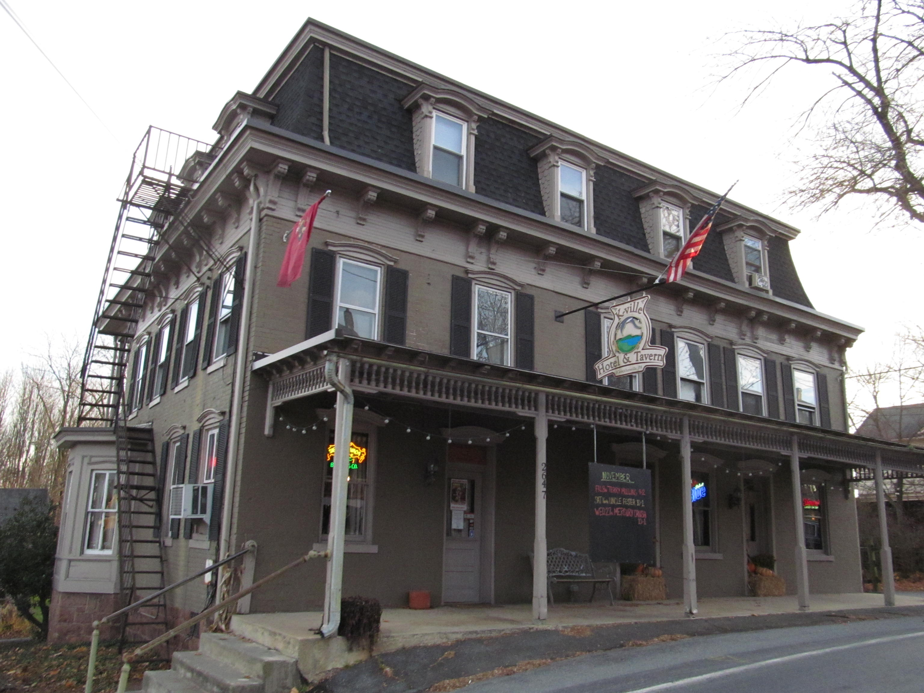 Kleinfeltersville Hotel & Tavern in Kleinfeltersville, Pennsylvania